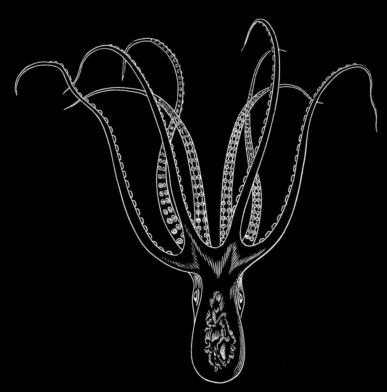 Octopus fulvus